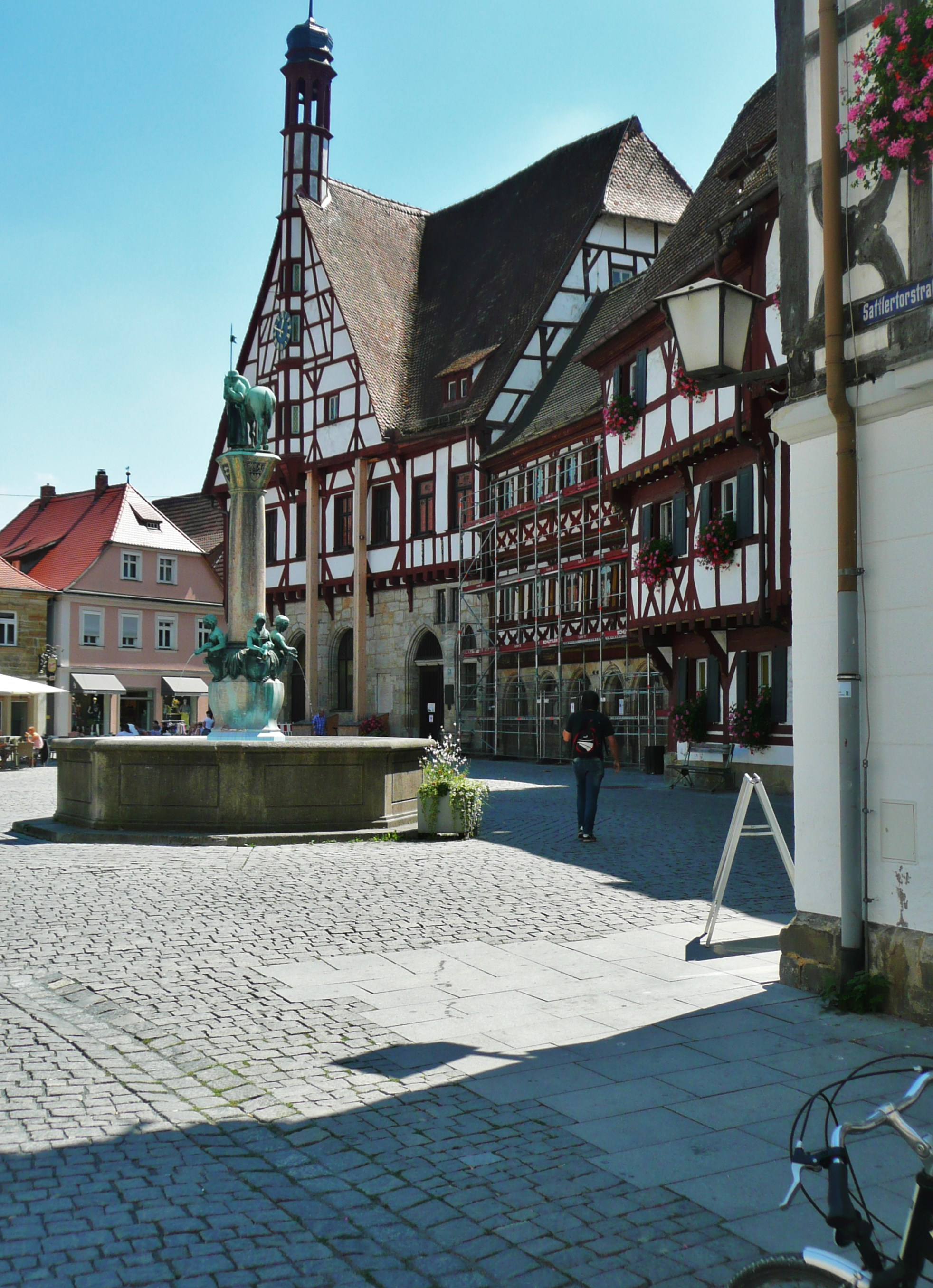 Ansicht des Rathaus Forchheim von der Sattlertorstraße